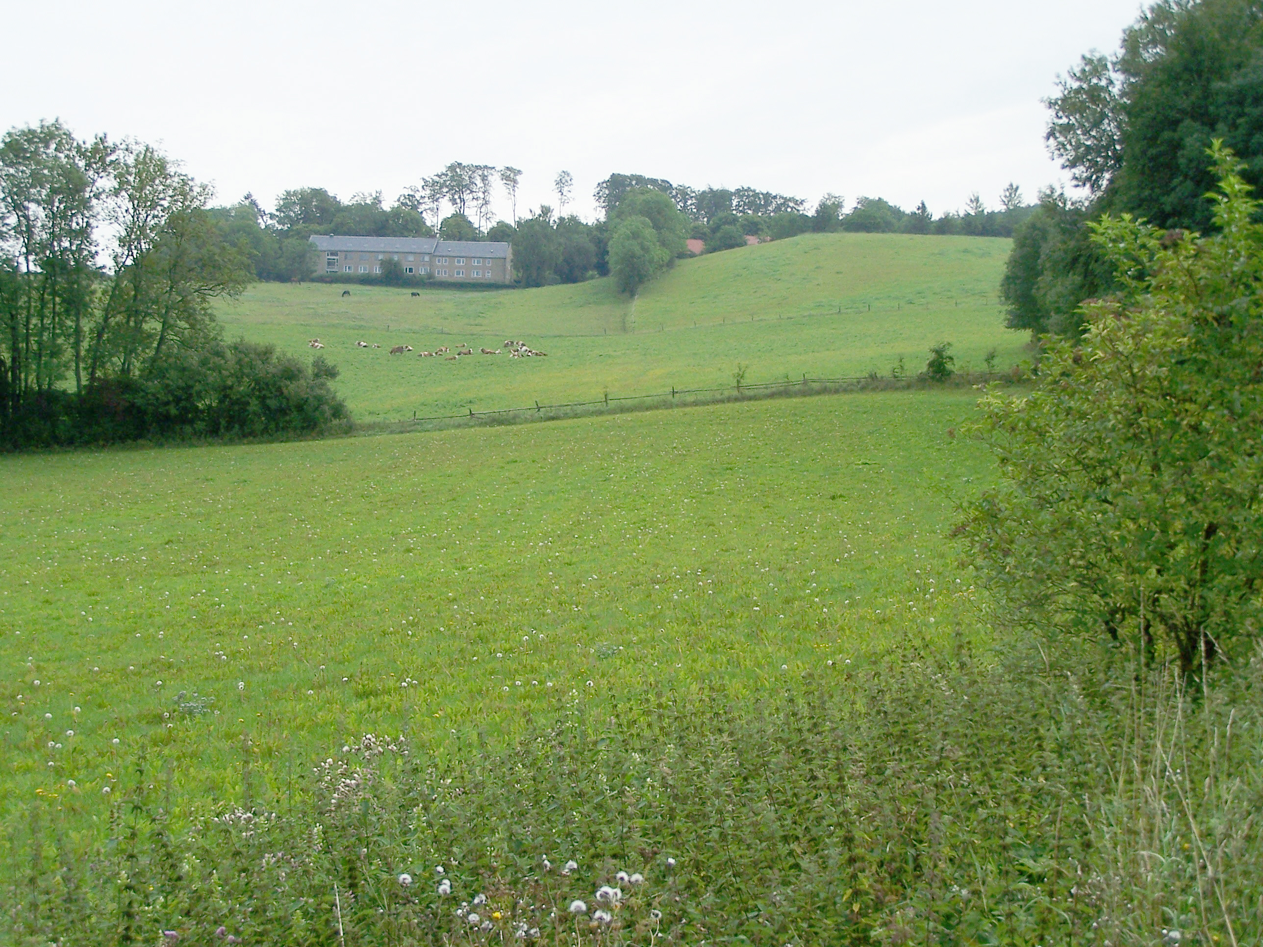 Blick von Süden (Hütschhofer Weg) zum Clausberg.